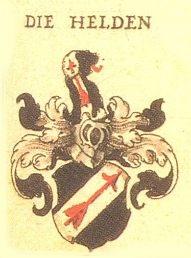 Wappen der Nürnberger ehrbaren Familie Held